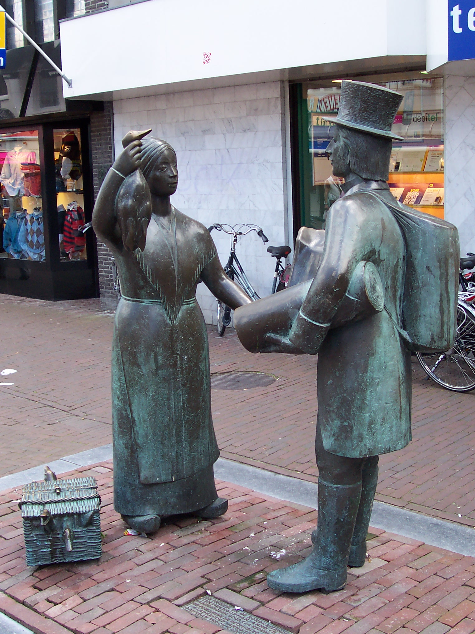 Sneek: Die Friesin und der umherziehende Textilienhändler. Anno 1841. Angeboten durch C&A Niederlande.